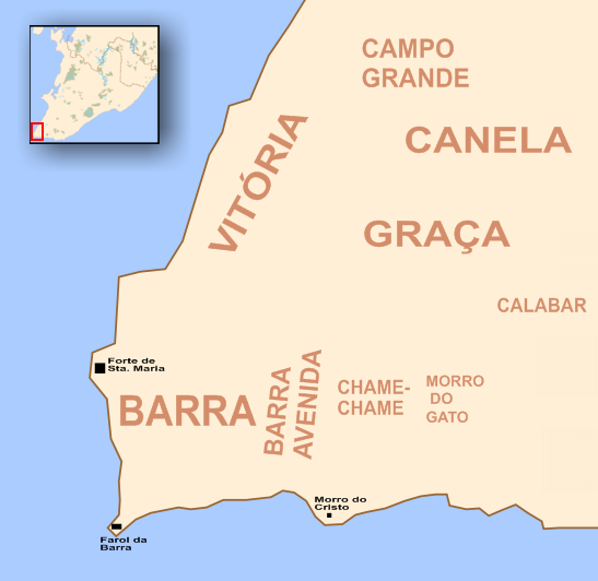 Bairro da Vitória - Mapa de Salvador (Bahia, Brazil)